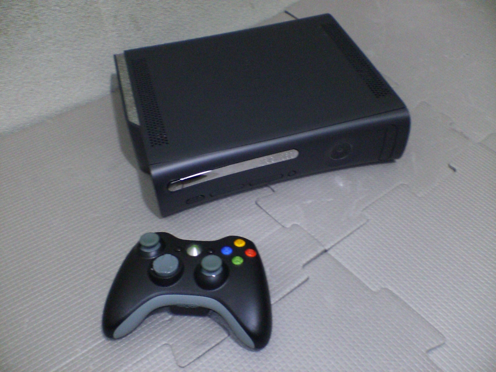 Xbox 360 Elite Console and Controller